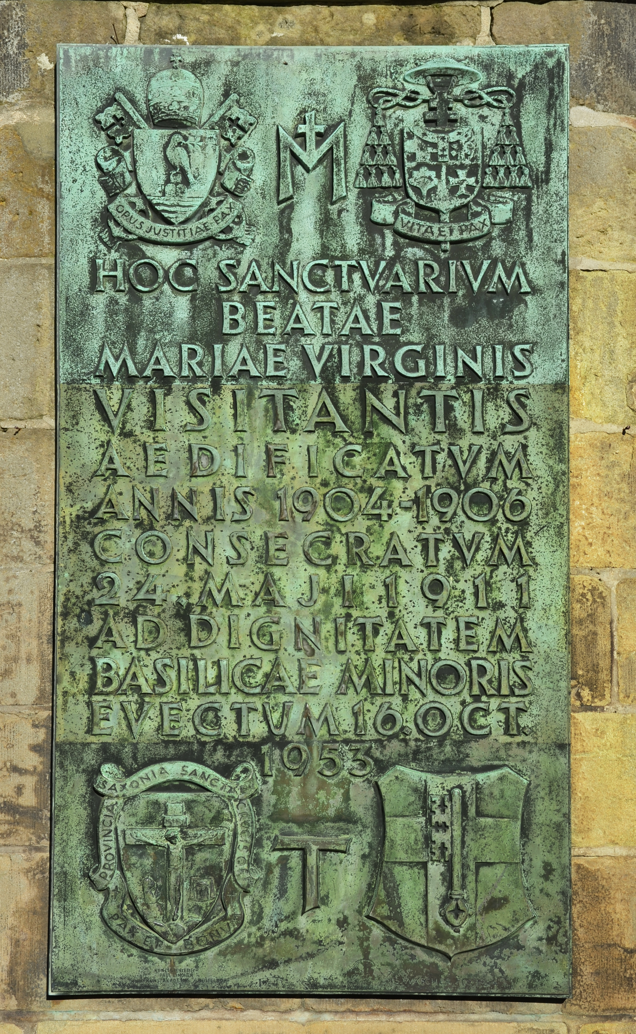 Denkmalgeschützte Basilika Mariä Heimsuchung (Werl), Gedenktafel anlässlich der Erhebung zur Basilika minor, mit vier Wappen